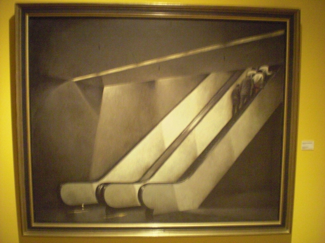 moderna arto